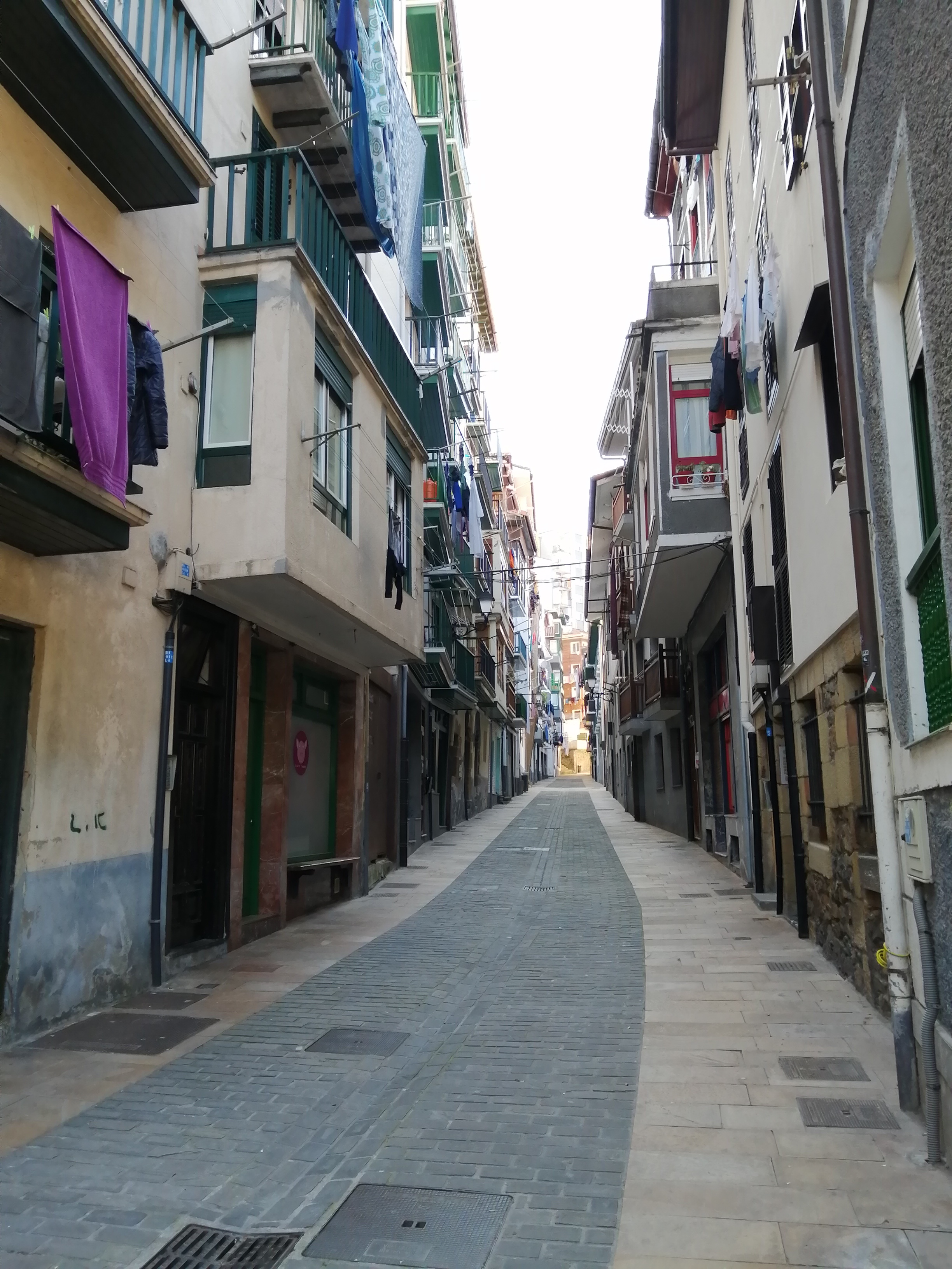 Ipar Kalea, Ondarroa